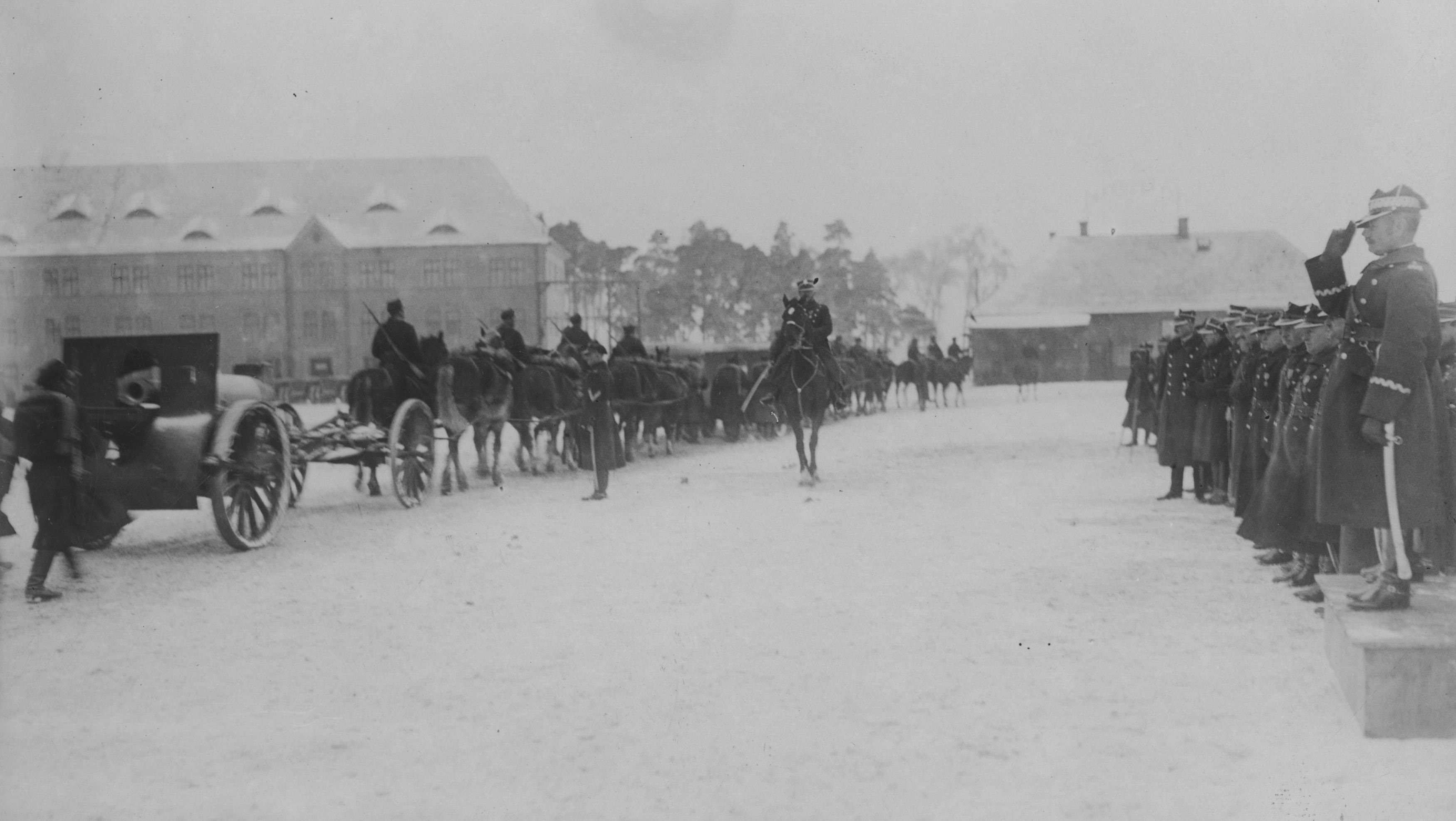 X - lecie 7 Pułku Artylerii Ciężkiej w Poznaniu. Defilada oddziałów artylerii ze 155 mm haubicą Schneider wz. 1917 przed gen. dyw. Kazimierzem Dzierżanowskim (pierwszy z prawej). Koncern Ilustrowany Kurier Codzienny - Archiwum Ilustracji. Sygnatura: 1-W-1527-1